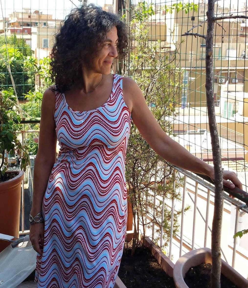 Maria Grazia Calandrone, luglio 2016